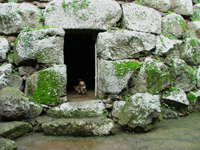 Nuraghe Santu Antine